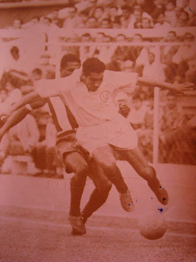 Partido Alianza-U con Villalba